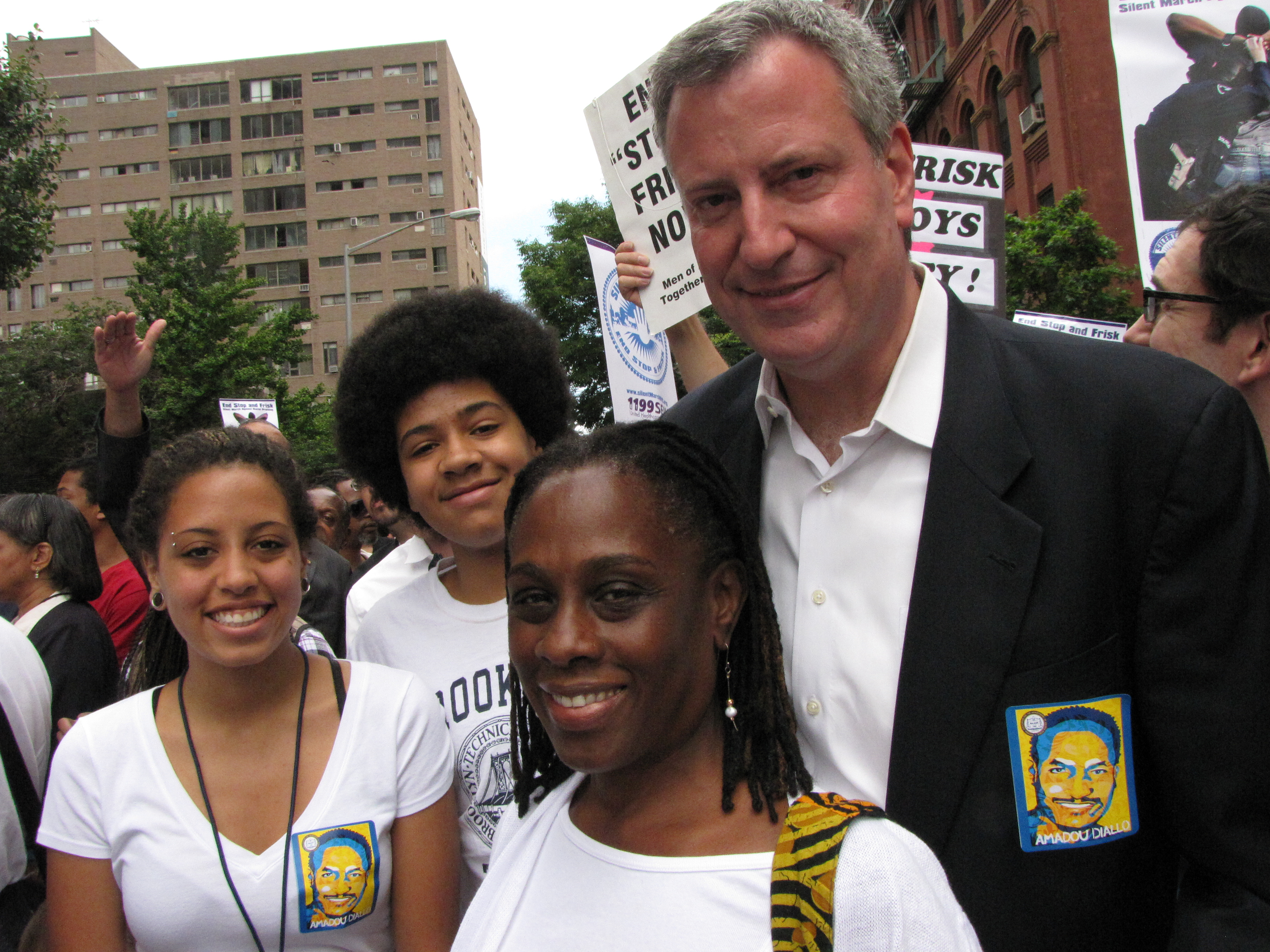 S&Q Silent March 2